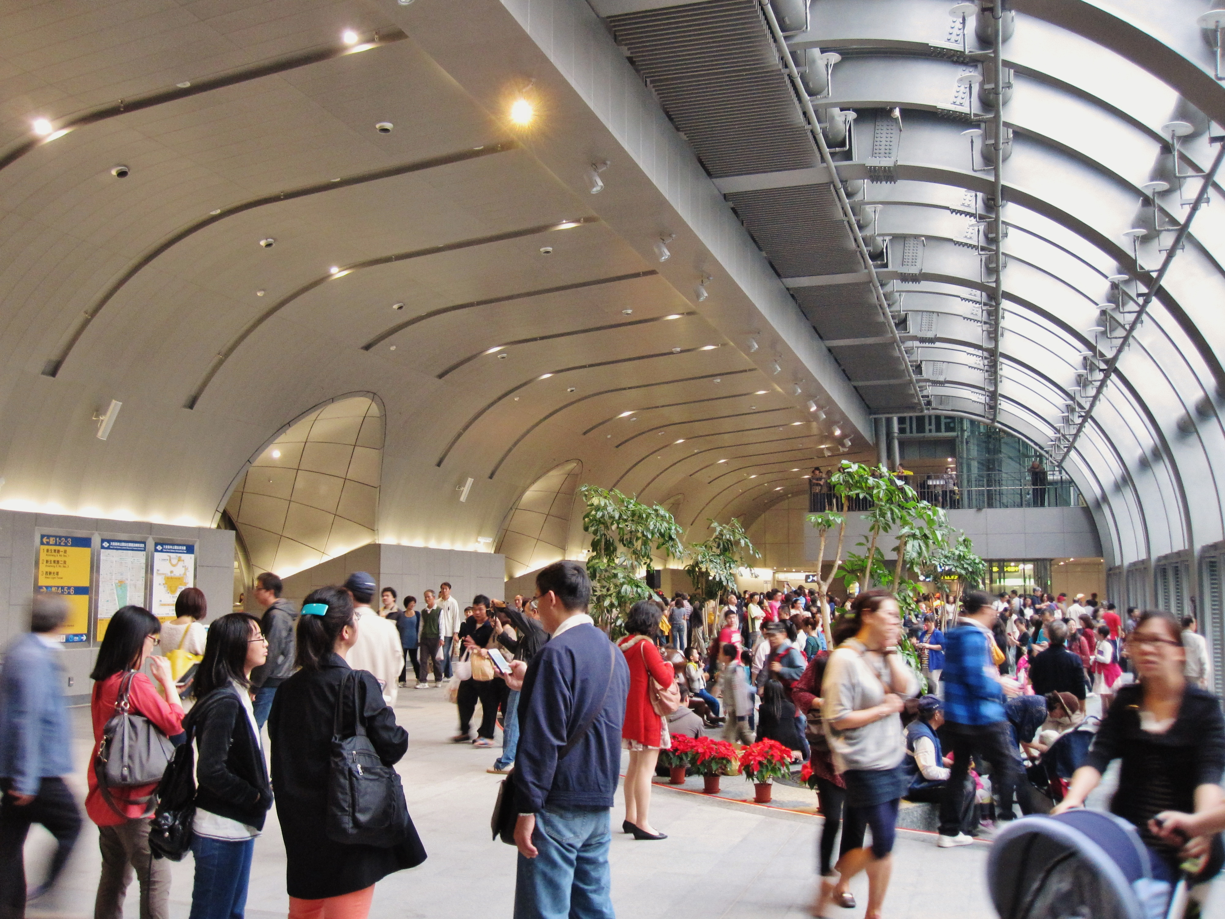 台北捷運信義線大安森林公園站B1穿堂層。